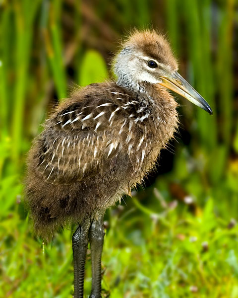 Limpkin Juvenile